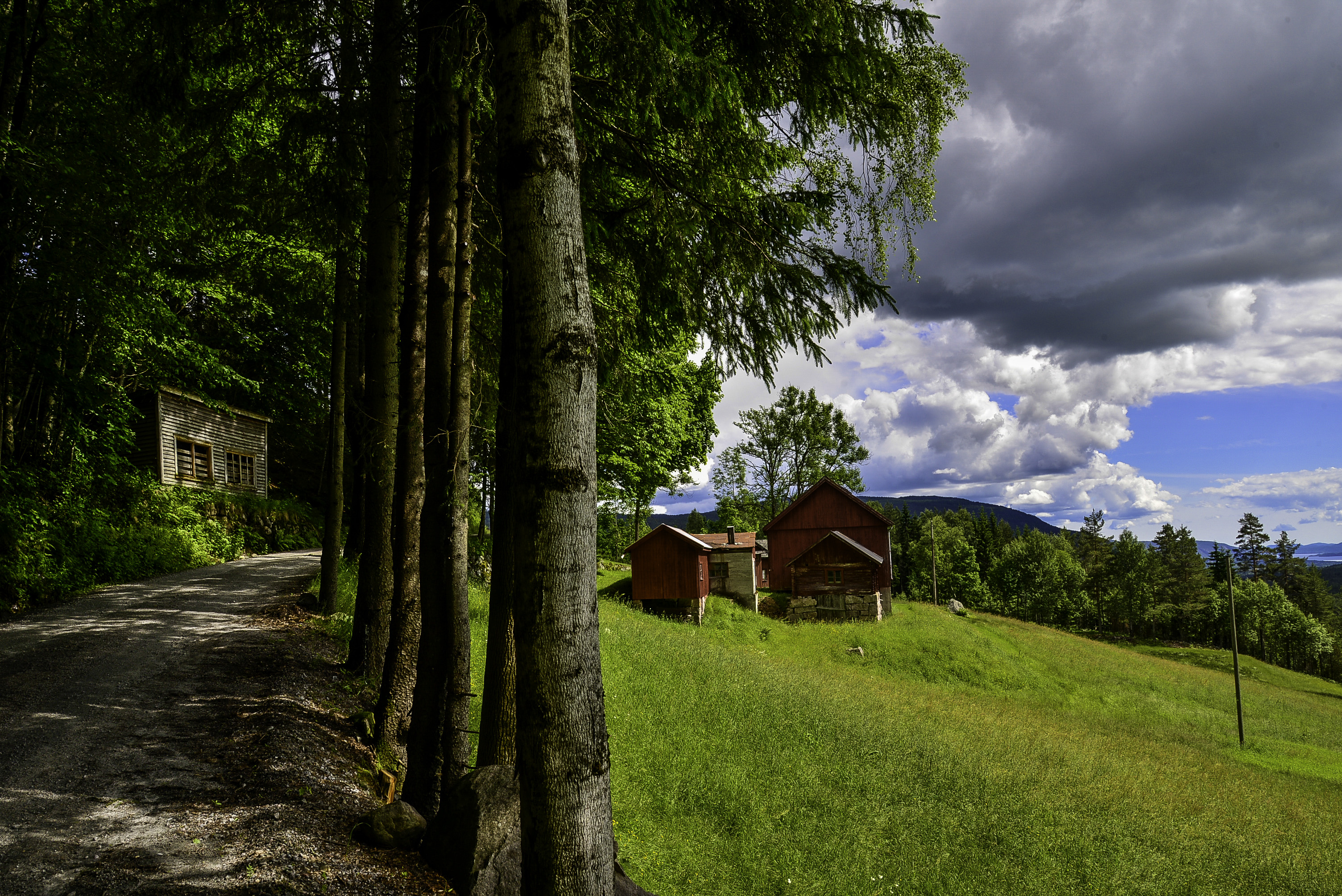 Gård-BøTelemark